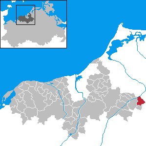 Grammow in Mecklenburg-Western Pomerania - District Bad Doberan